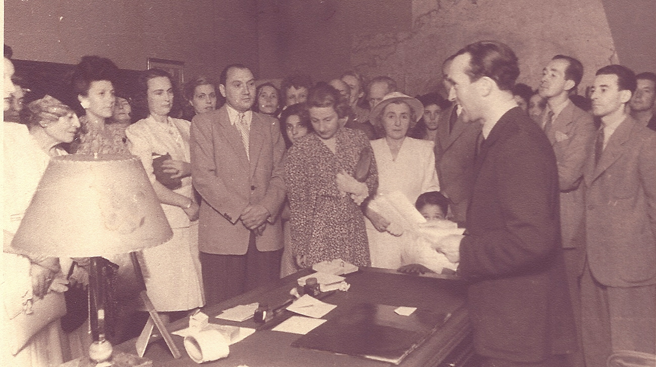 DISCOURS DU 14 JULLET 1946 PAR FRANCOIS DE VIAL CONSUL DE FRANCE A FLORENCE